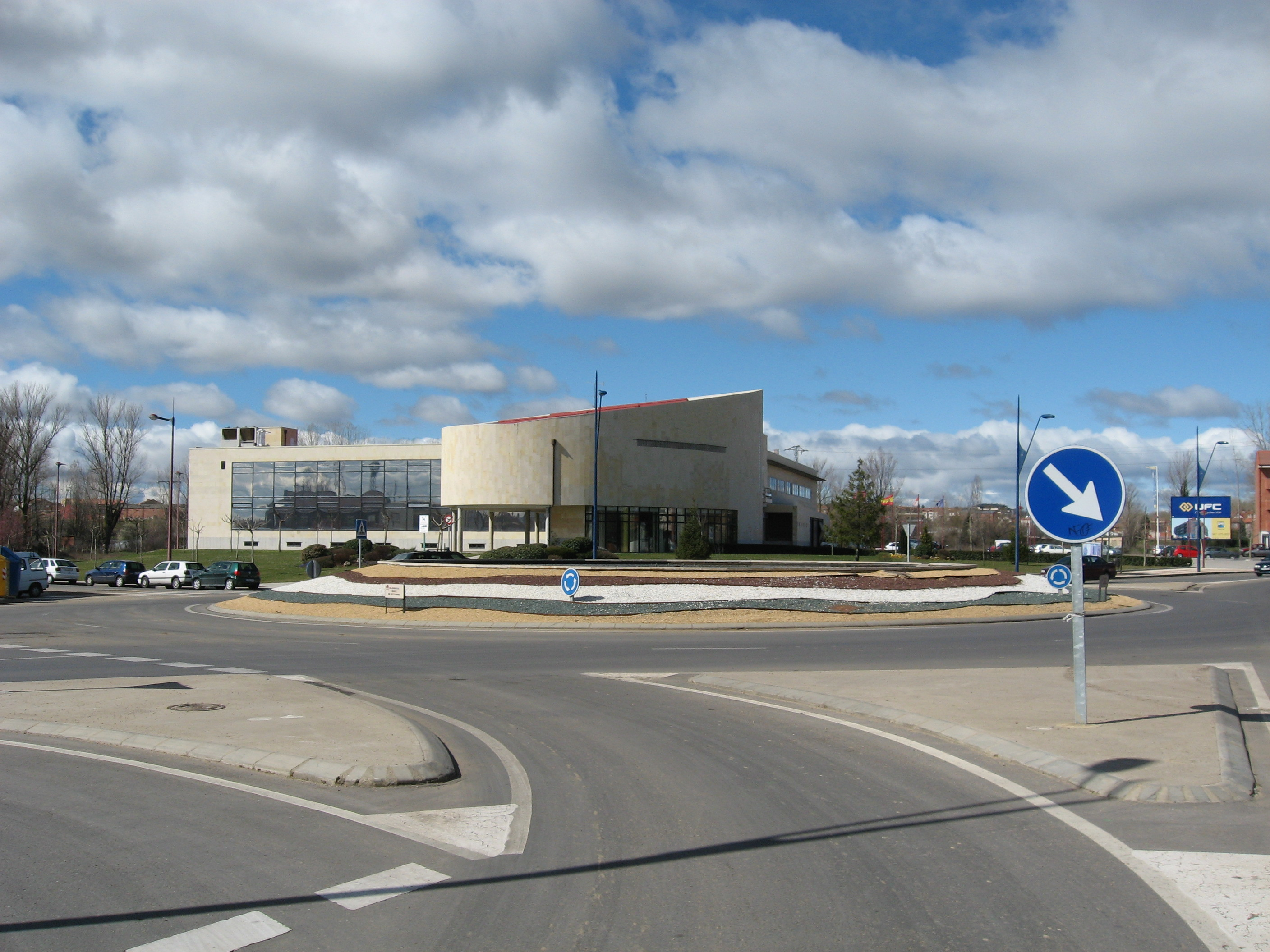 Ayuntamiento de San Andrés del Rabanedo, en León (España)